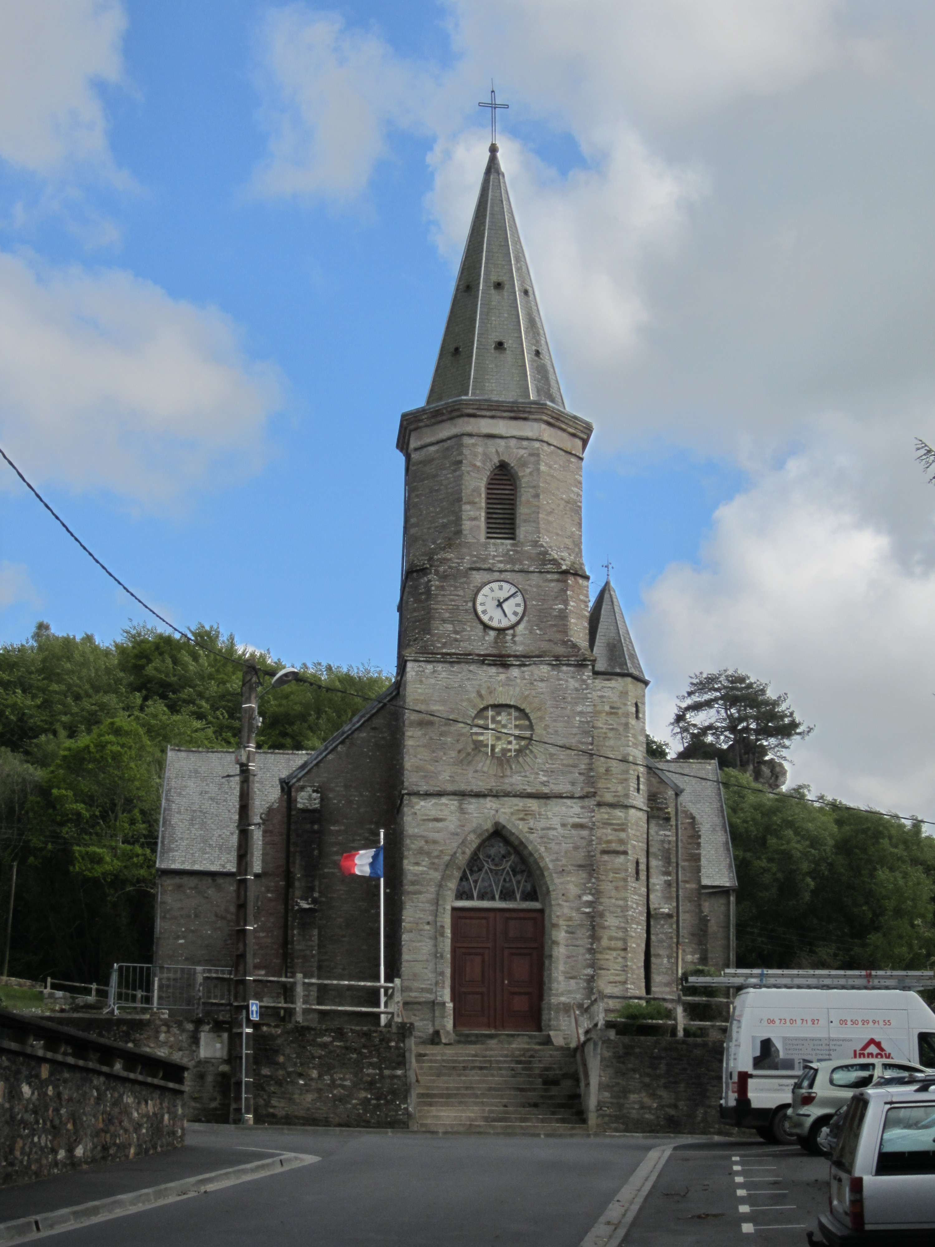 la Glacerie, Manche